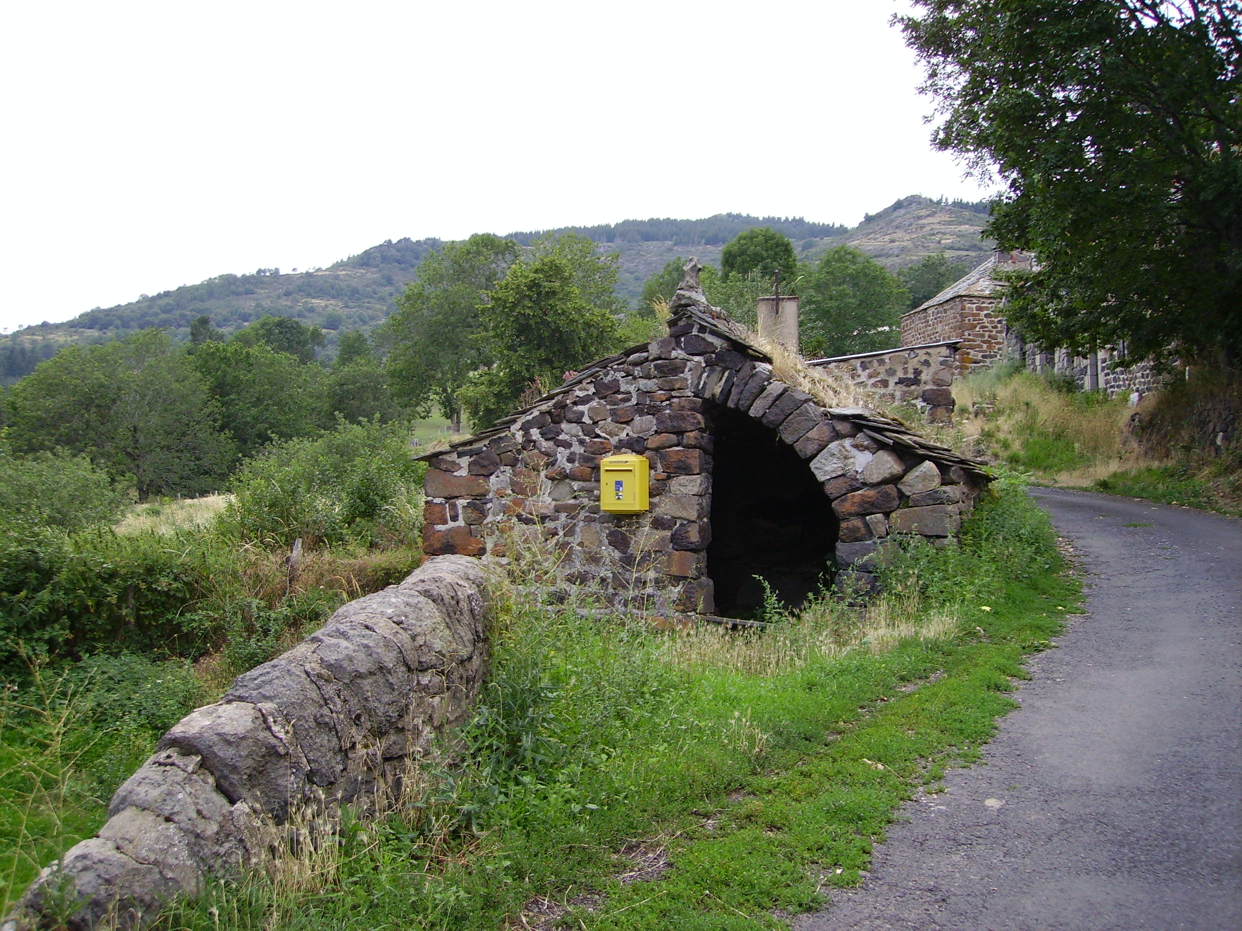 Hameau de Serres, Commune de Chanéac, Ardèche, France. Photo prise par Arnaud-Victor Monteux le 09/07/2006.